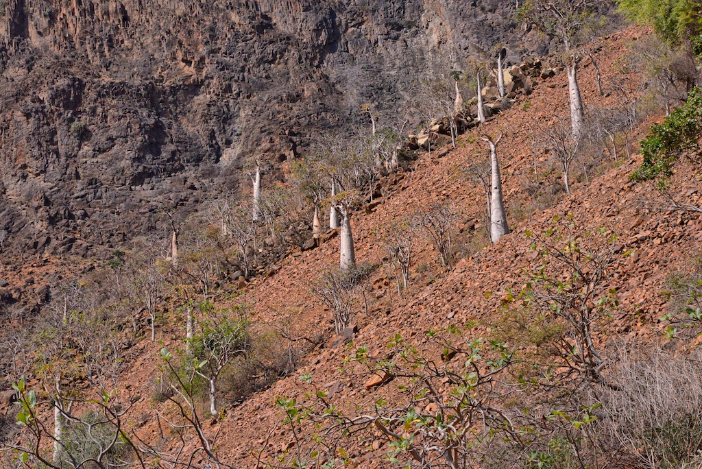 Yemen